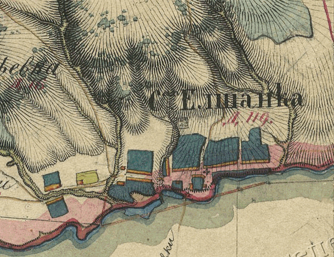 Село Елшанка на одноверстной карте Менде Симбирской губернии 1861 г.